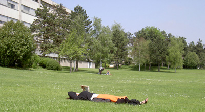 École Centrale Paris trädgård Beskrivning: Den parkliknande trädgård som omger École Centrale Paris. Källa: Fotografens arkiv Fotograf: Per Berséus, salsero Kamera: Konika Digital Revio KD-400Z Tidpunkt: Mars 2004 Licens: GNU FDL